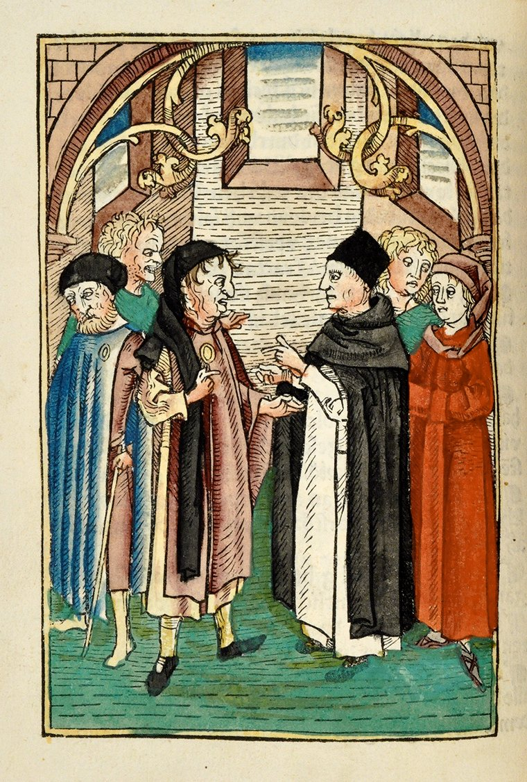 Disput zwischen Dominikanern und Juden. Illustration zu Petrus Nigers Stern des Meschiah. Holzschnitt, handkoloriert